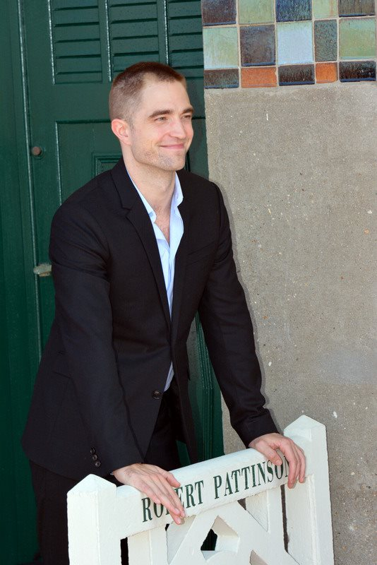 Robert Pattinson au festival du cinéma américain de Deauville